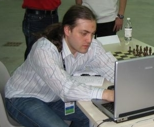 anno 2006